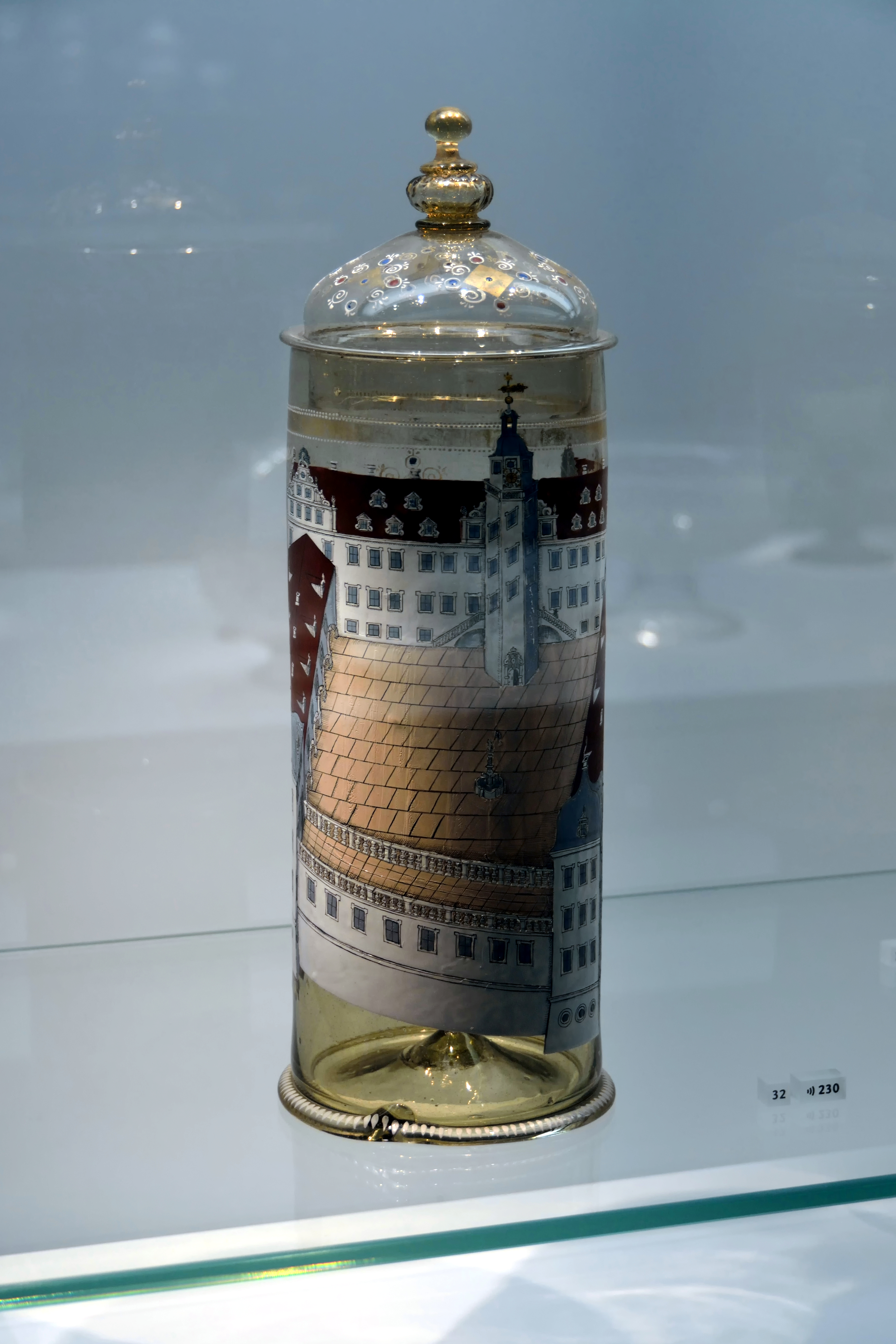 Impressionen aus dem Landesmuseum Württemberg in Stuttgart. Ein Deckelhumpen mit einer Ansicht vom Schloss Coswig aus dem Jahre 1676